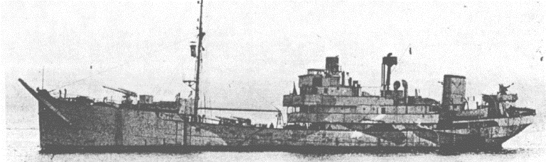 Das (frei-)französische Wachschiff President Houduce